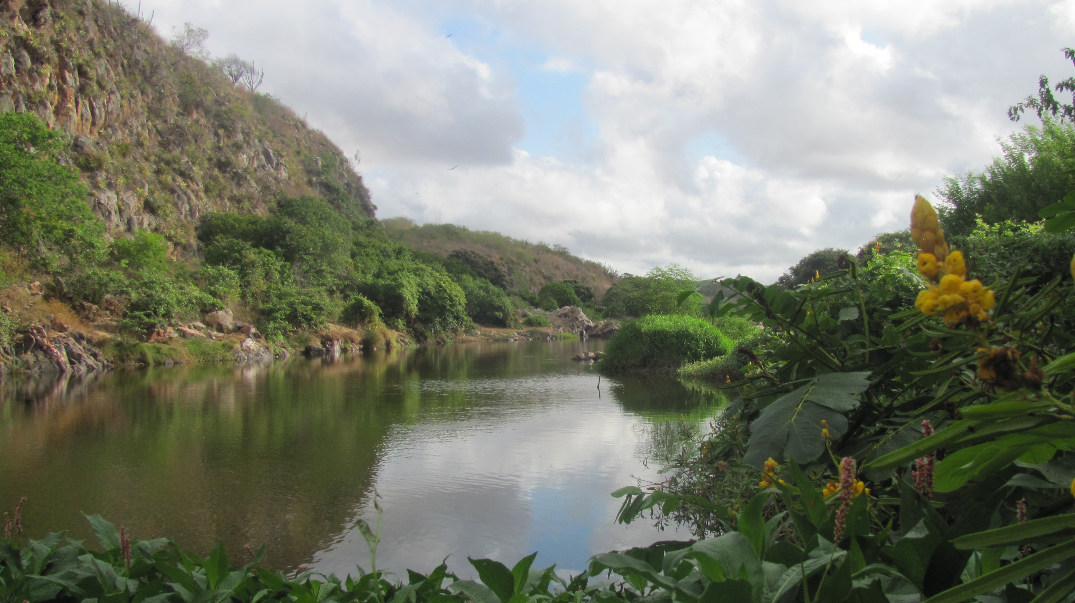 Vegetação e flores tipicas do rio Itapicuru, em Barreira, em Araci, na Bahia, no Brasil.